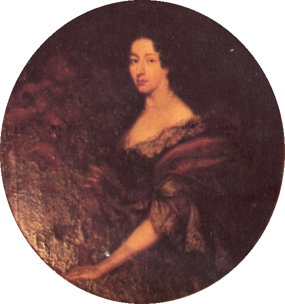 Countness Amalia Regina of Ortenburg (died 1709)